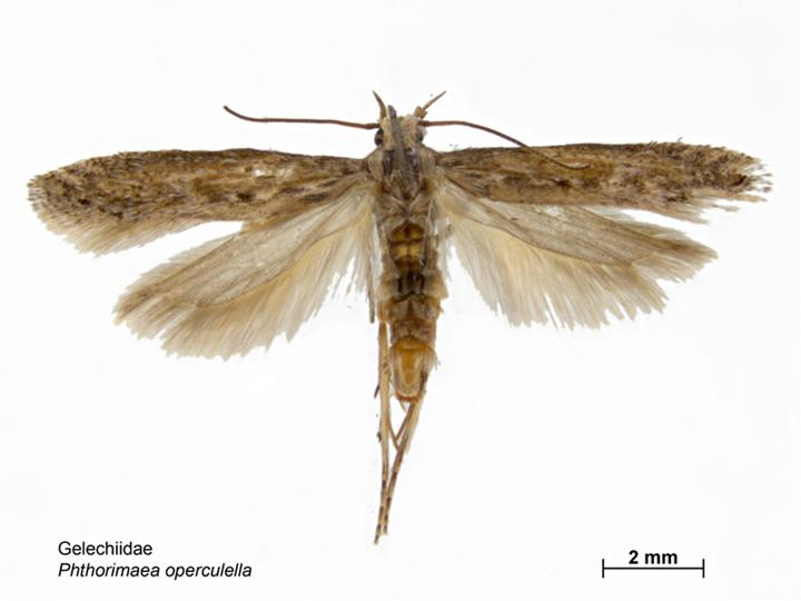 Phthorimaea operculella, dorsal view